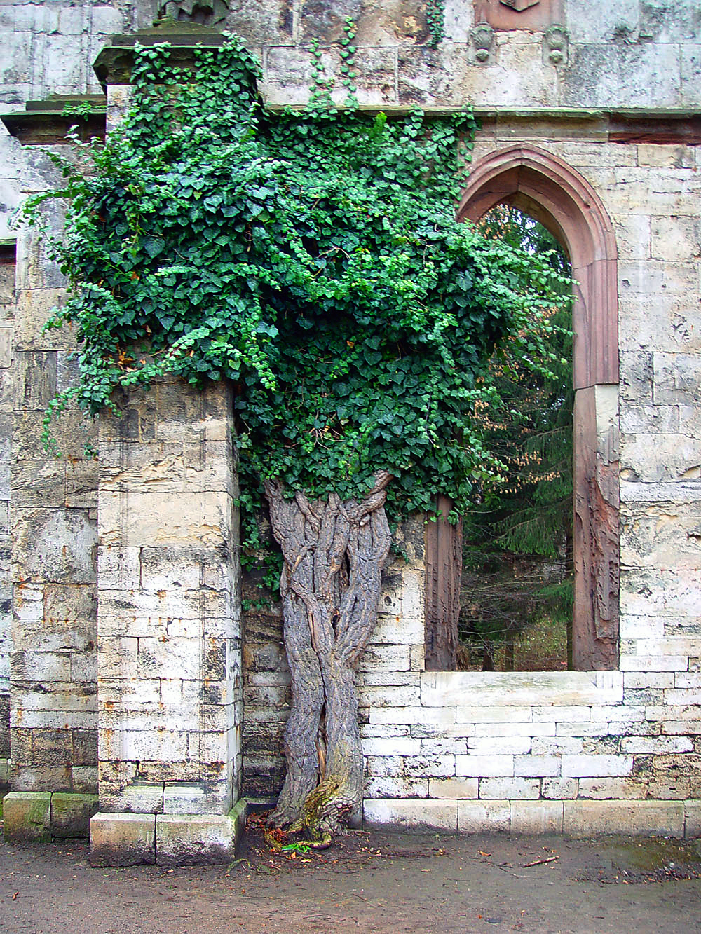 Hedera helix (Efeu, Ivy, Lierre, Klimop, Vedbend, Murgröna) an der Ruine des Tempelherrenhauses in Weimar